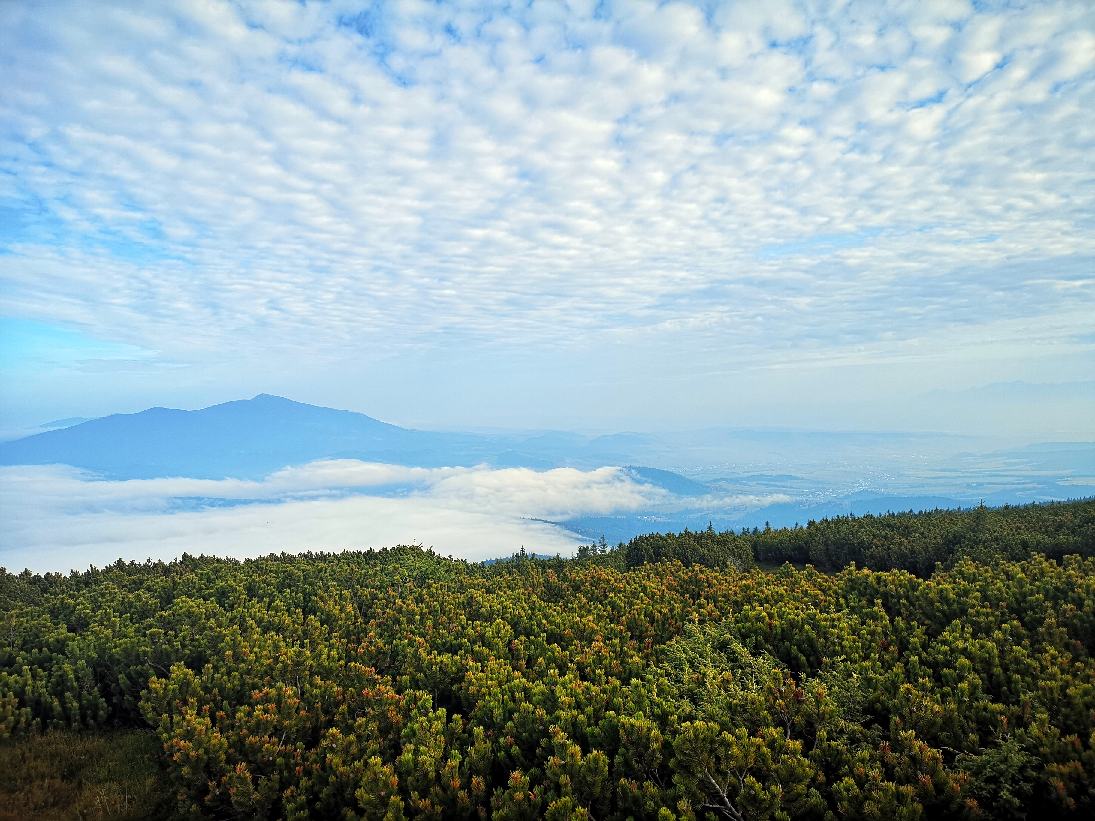 Pilsko